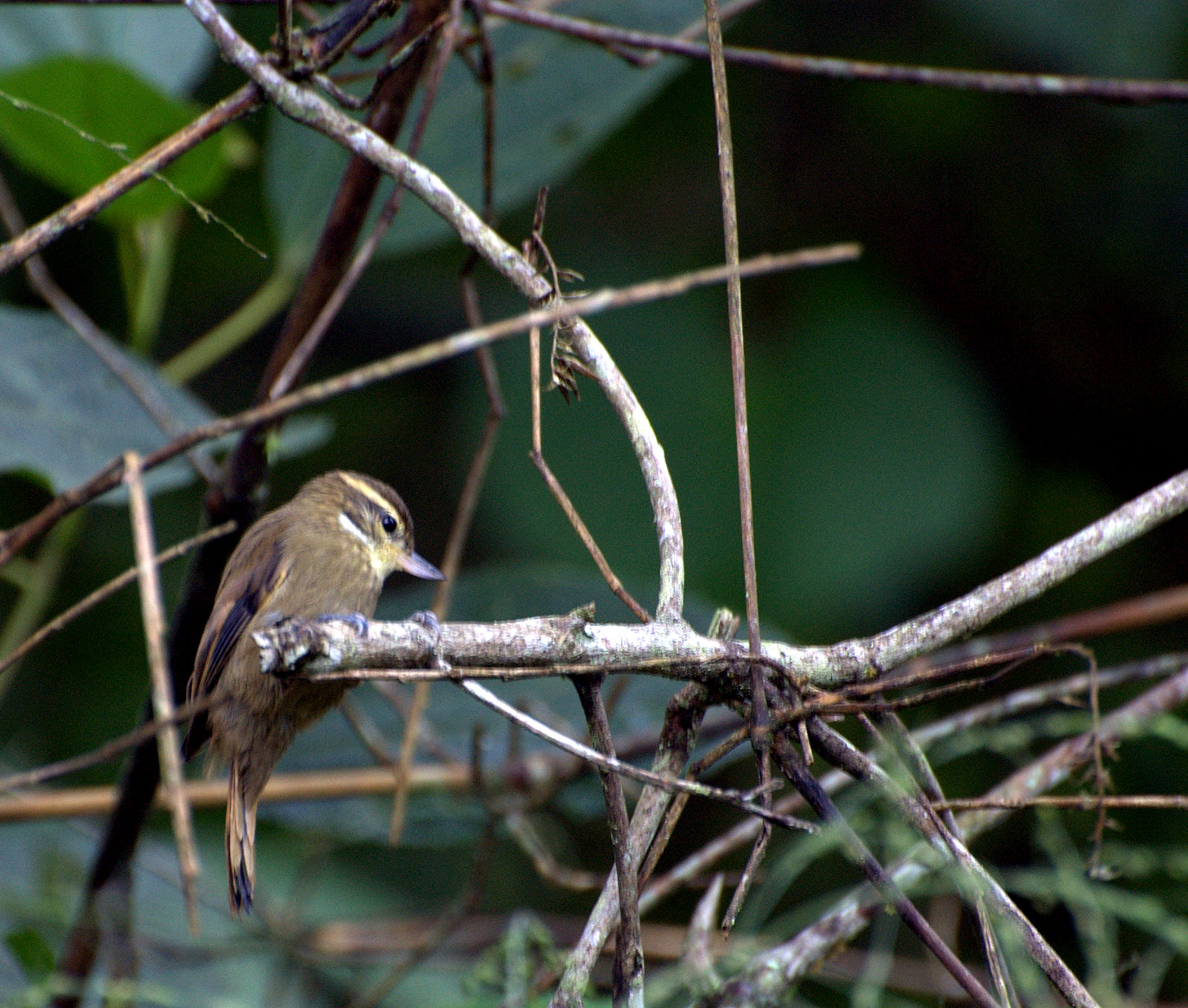 Plain Xenops Xenops minutus. Rodovia Empei Hiraide SP-139, próximo à cidade de Registro-SP